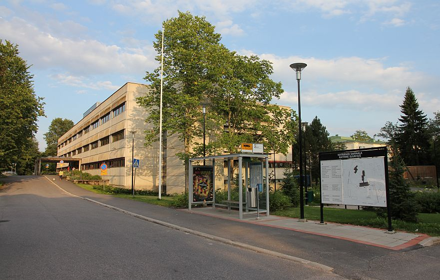 Katriinan sairaala Vantaan Seutulassa. Huom: Muista säilyttää viittaus kuvaajaan, mikäli käytät kuvaa.